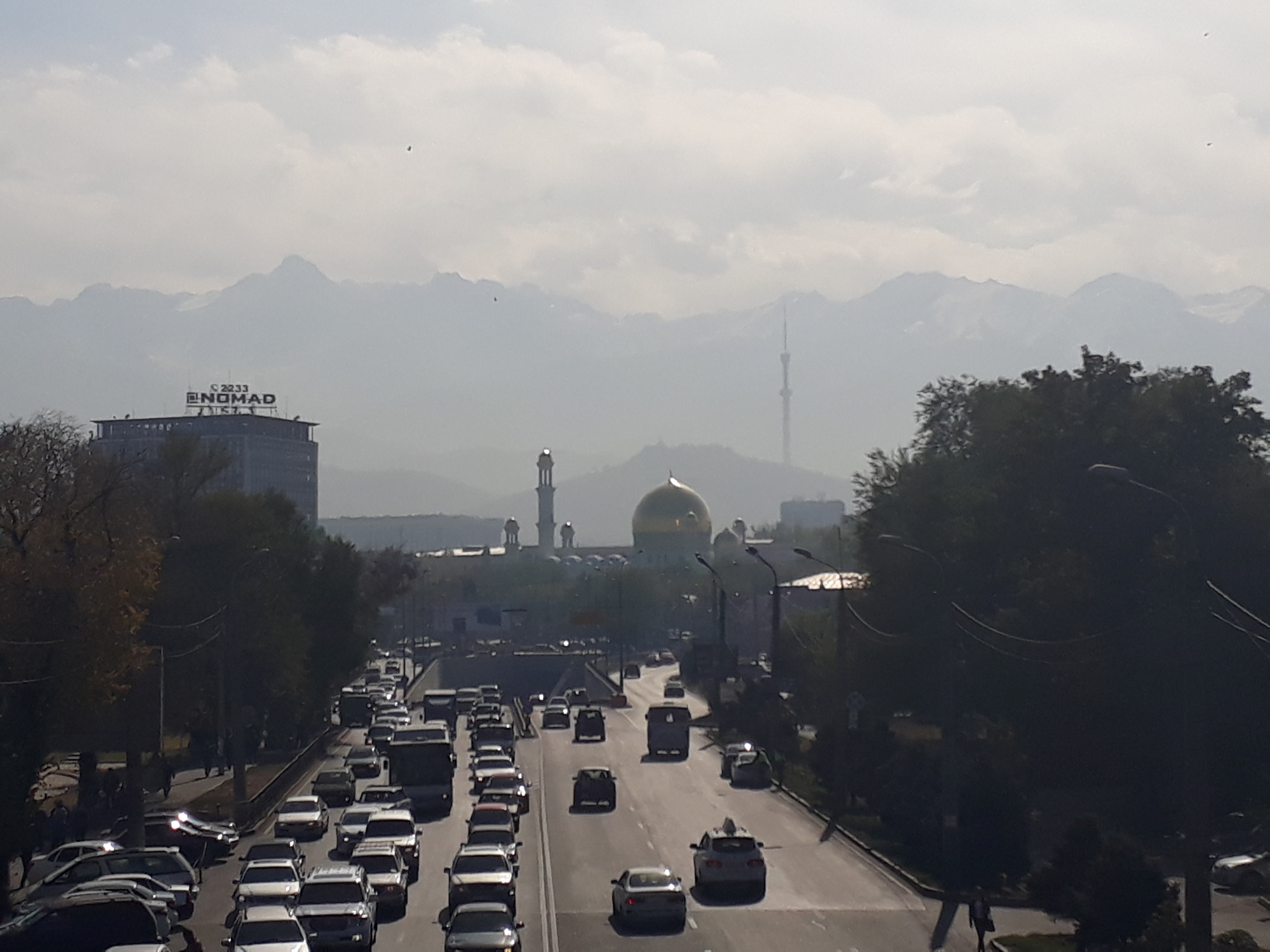 Вид с надземного пешеходного перехода